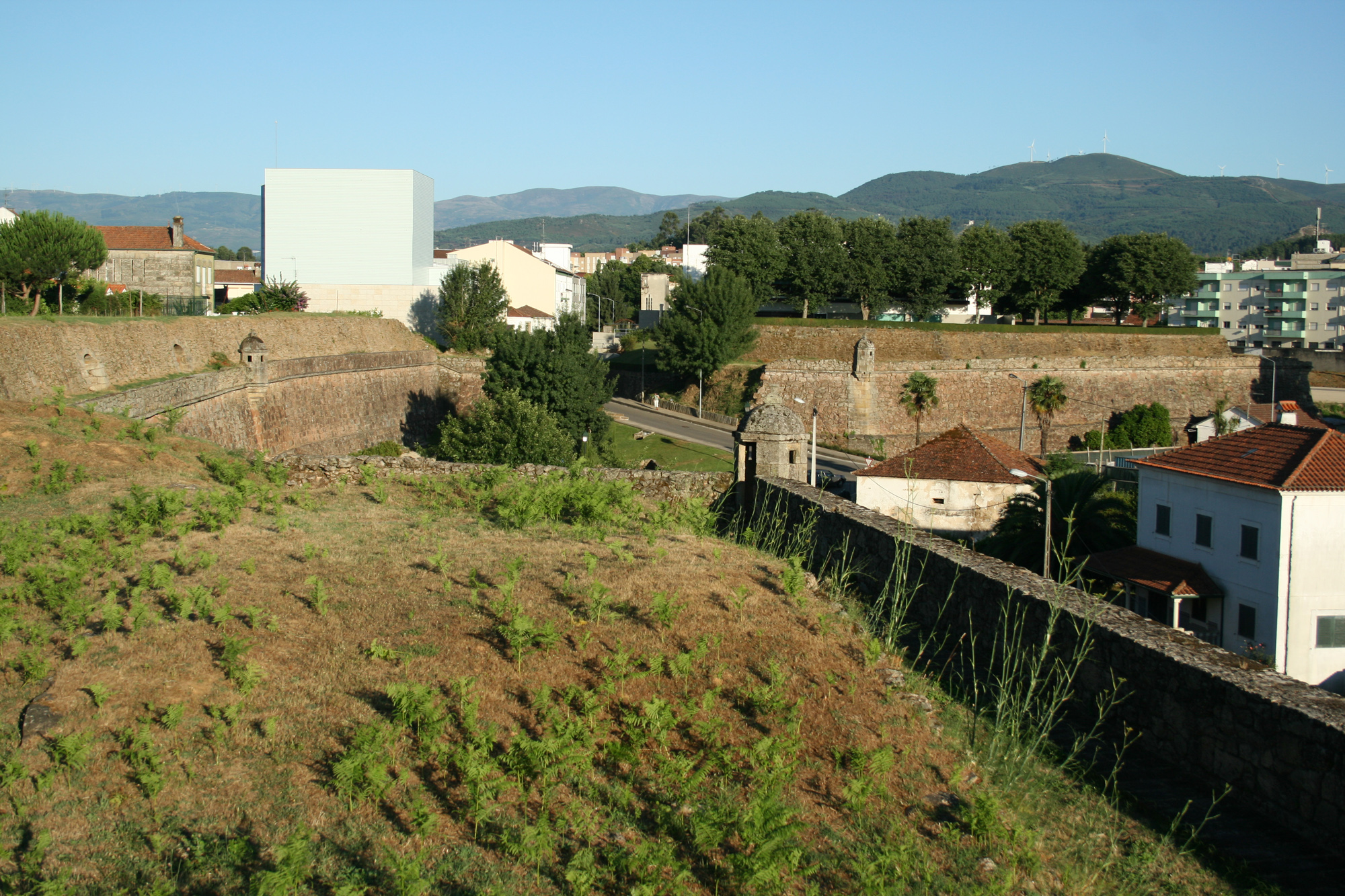 Fortaleza de Monção, en el norte de Portugal, junto a la frontera con España. Fortress of Monção Fortress of Monção, in northern Portugal, near the border with Spain.